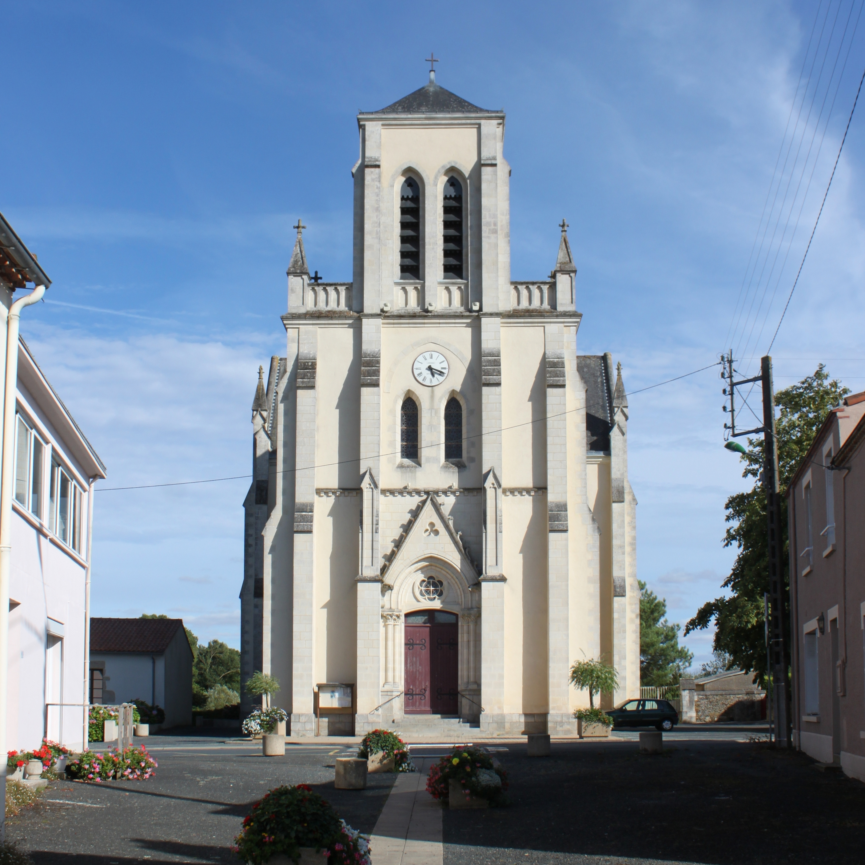 Église Saint-André (1810), Fr-85-Saint-André-Treize-Voies.